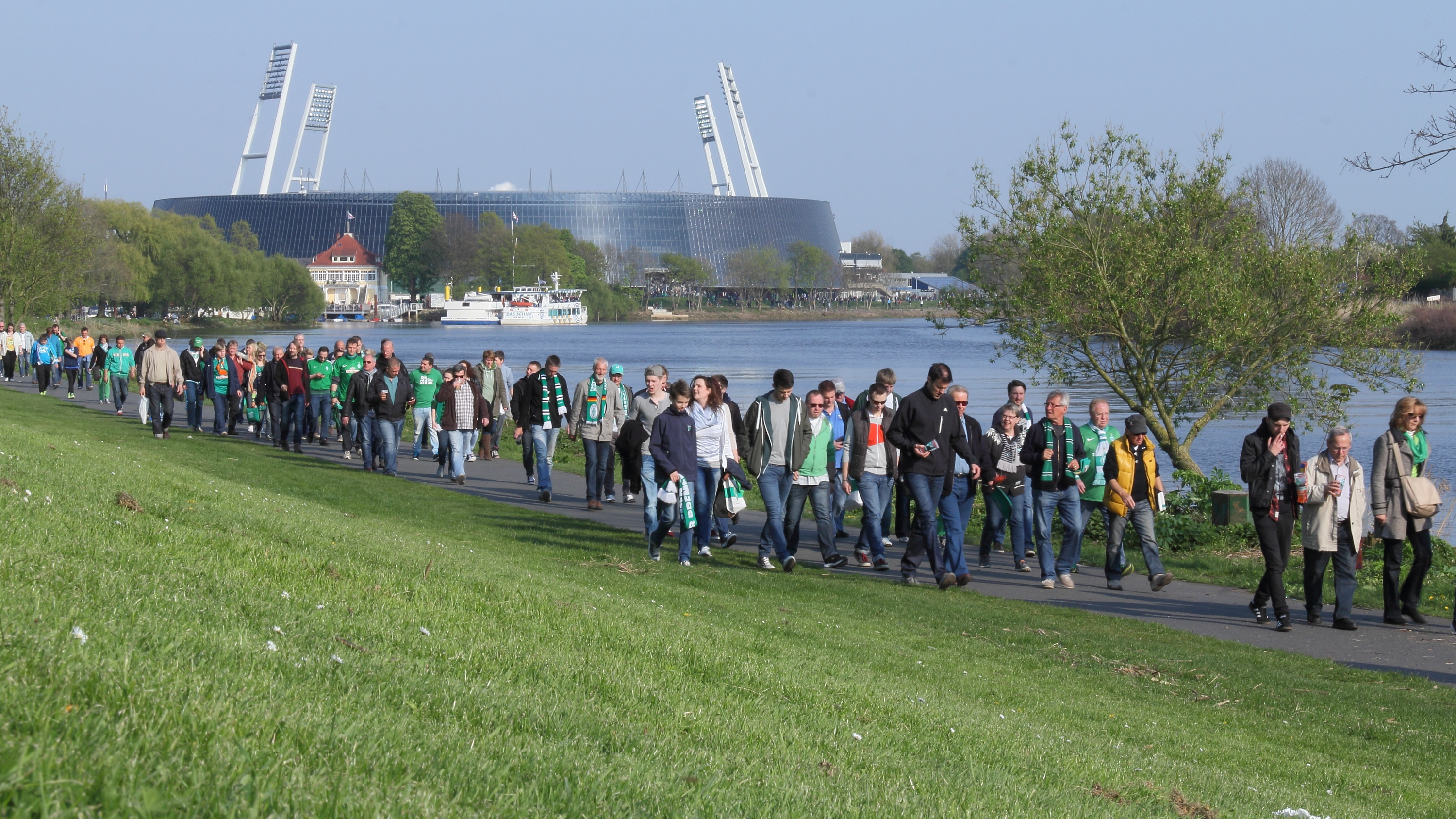 Weserstadion (Werder - Hoffenheim 3:1)